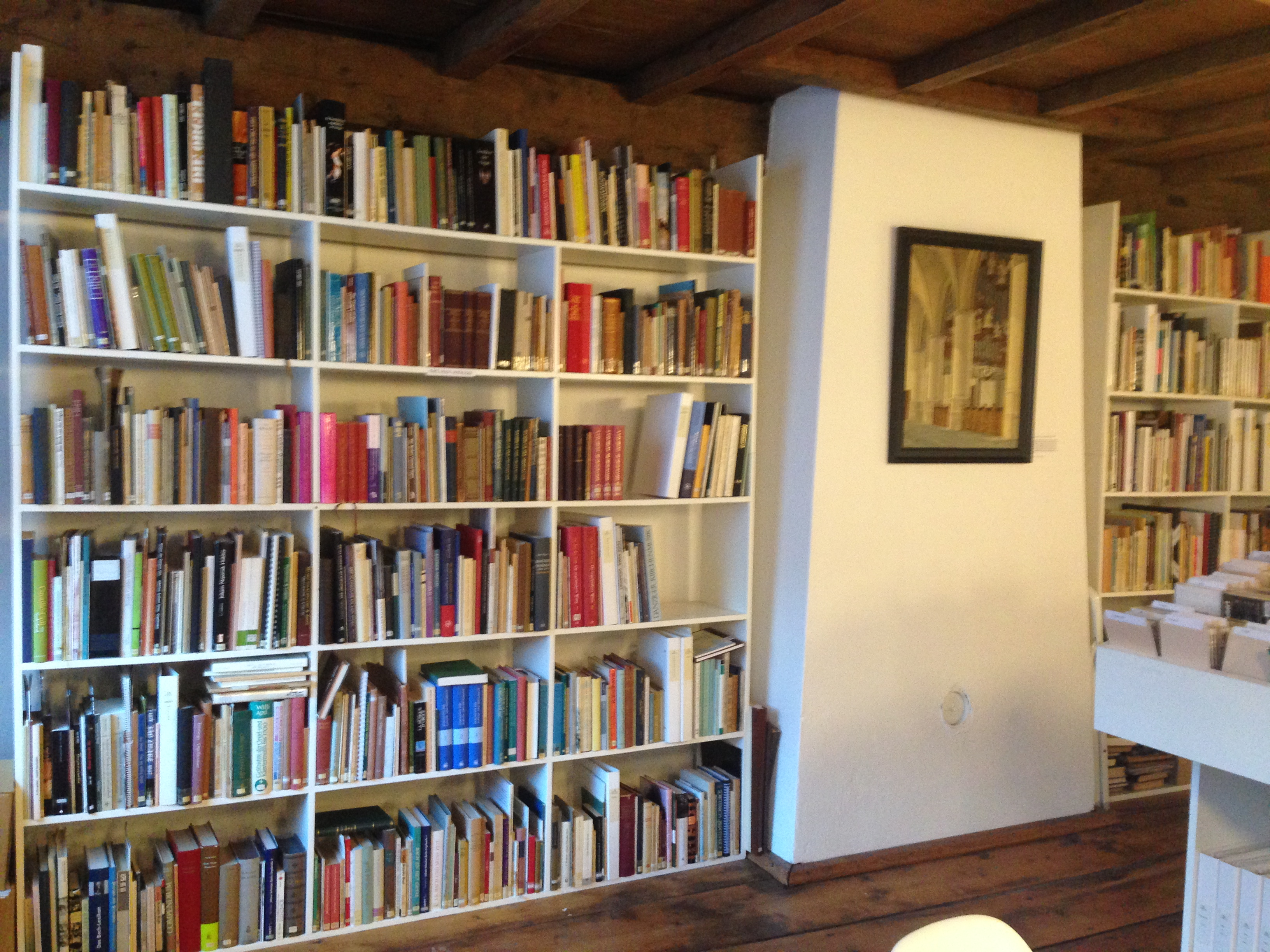 Nationaal Orgelmuseum, Elburg, Netherlands